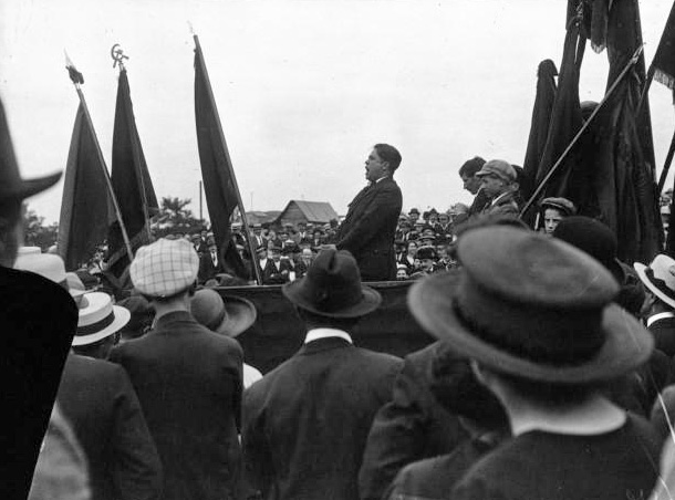 Pré St Gervais, manifestation en l'honneur de Marty : discours de Vaillant Couturier : photographie de presse